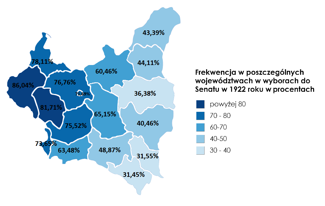 mapa II RP podzielona na województwa z naniesioną skalą kolorów (kartogram) na podstawie